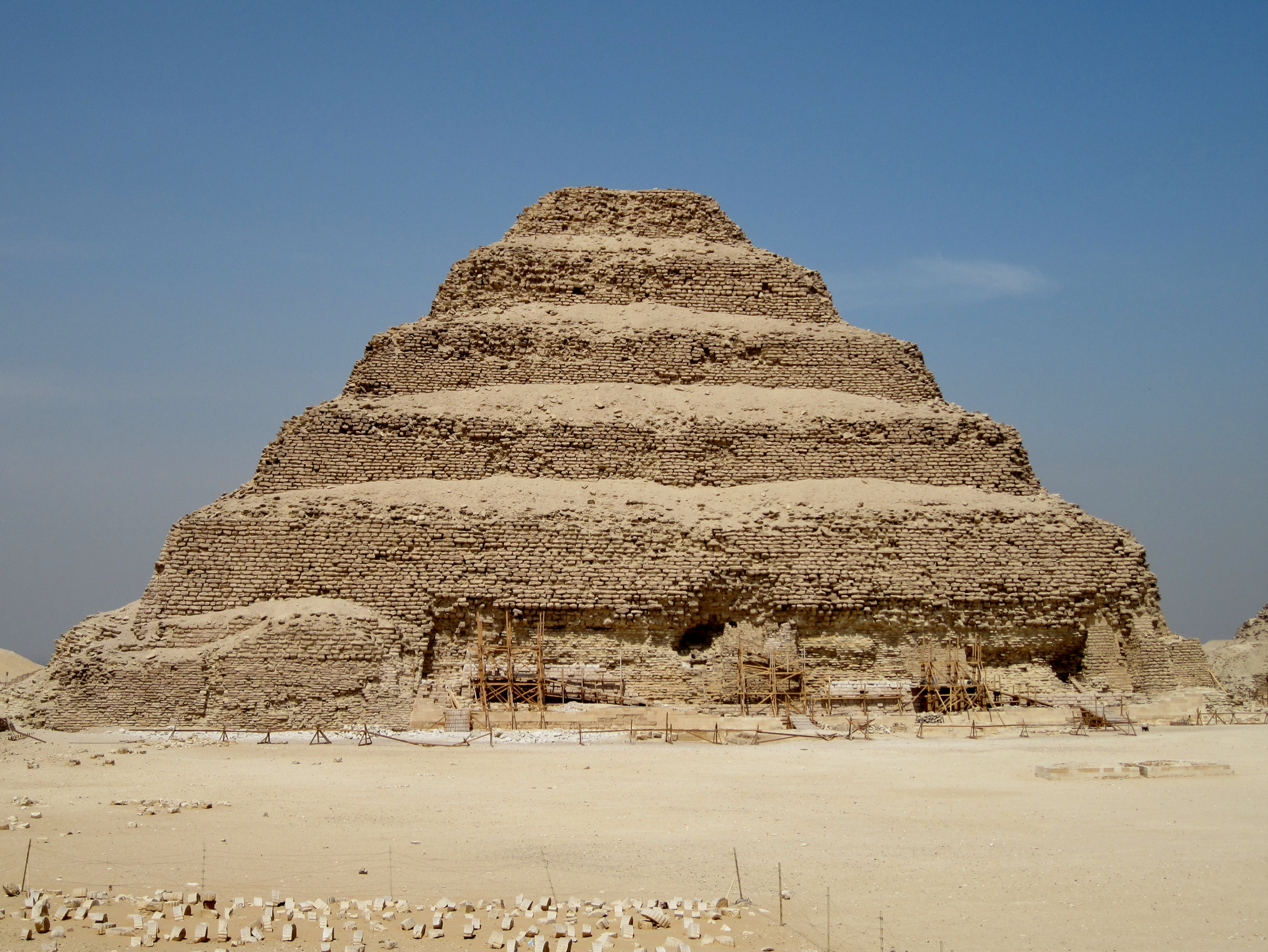 Stufenpyramide des Pharao Djoser aus der 3. Dynastie des Alten Reiches in Ägypten (um 2670 v. Chr.)